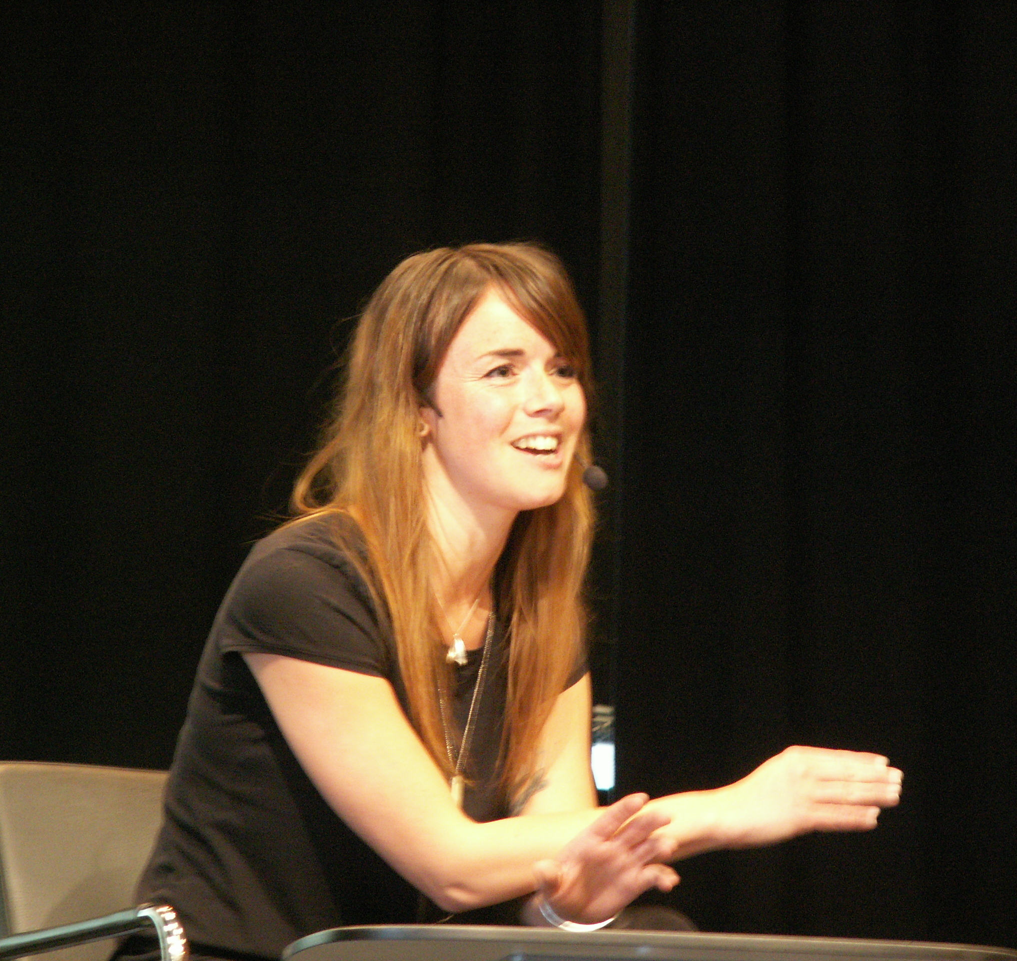 Stina Hjelm vid Stockholms internationella seriefestival 2014.